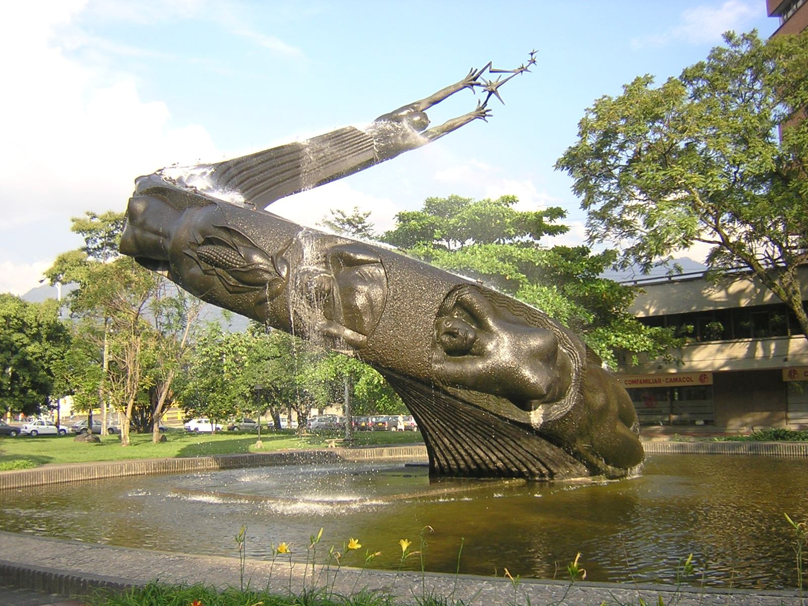 "La Vida", Escultura de Rodrigo Arenas Betancur, 14m de diámetro, 14 m de altura. Plazoleta del edificio Suramericana de Seguros, Medellín, Colombia.